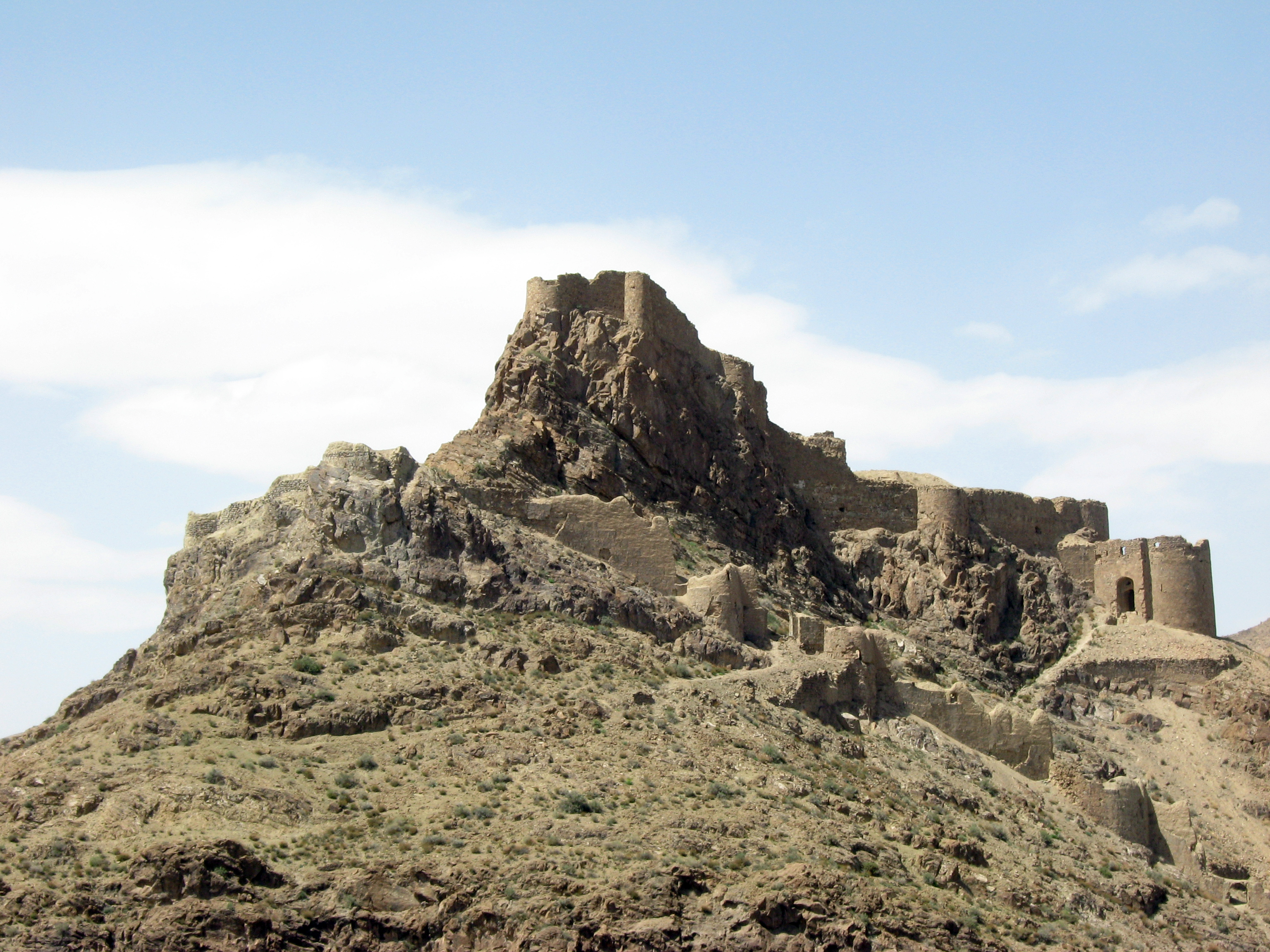 سارو ی بزرگ